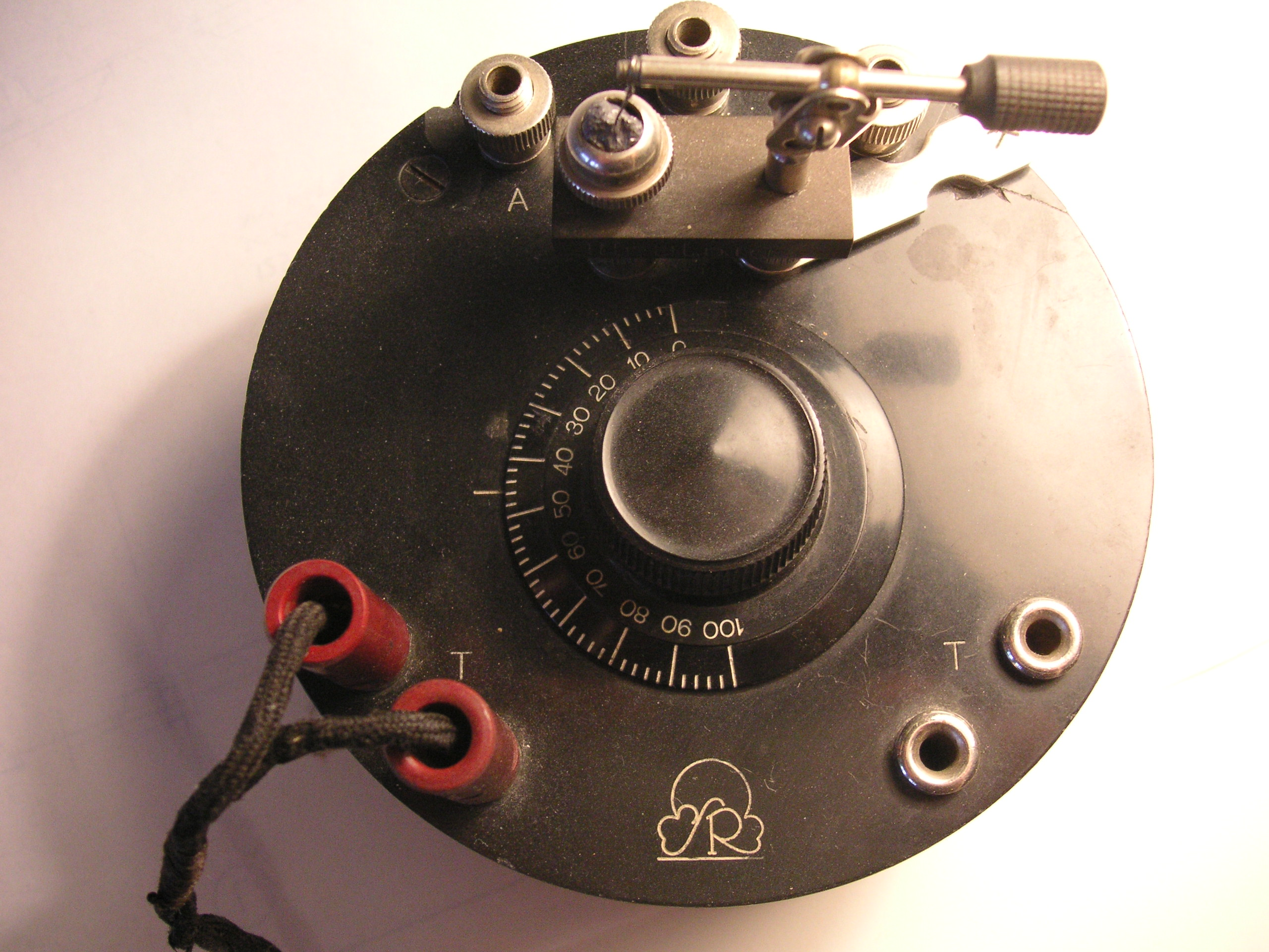 Svensk kristallmottagare av märke "Radiola" från 1922, detalj